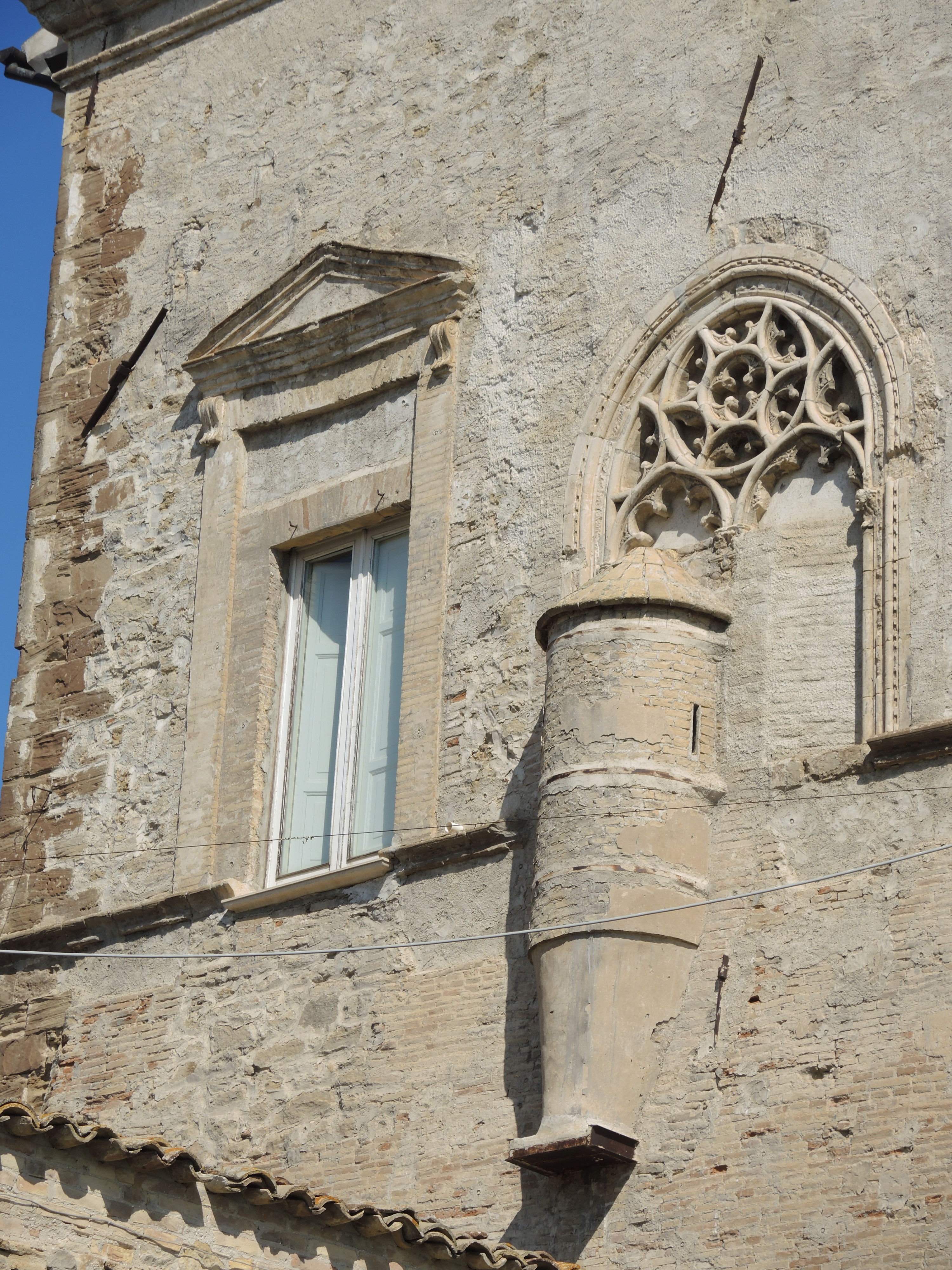 Palazzo d'Avalos This is a photo of a monument which is part of cultural heritage of Italy.